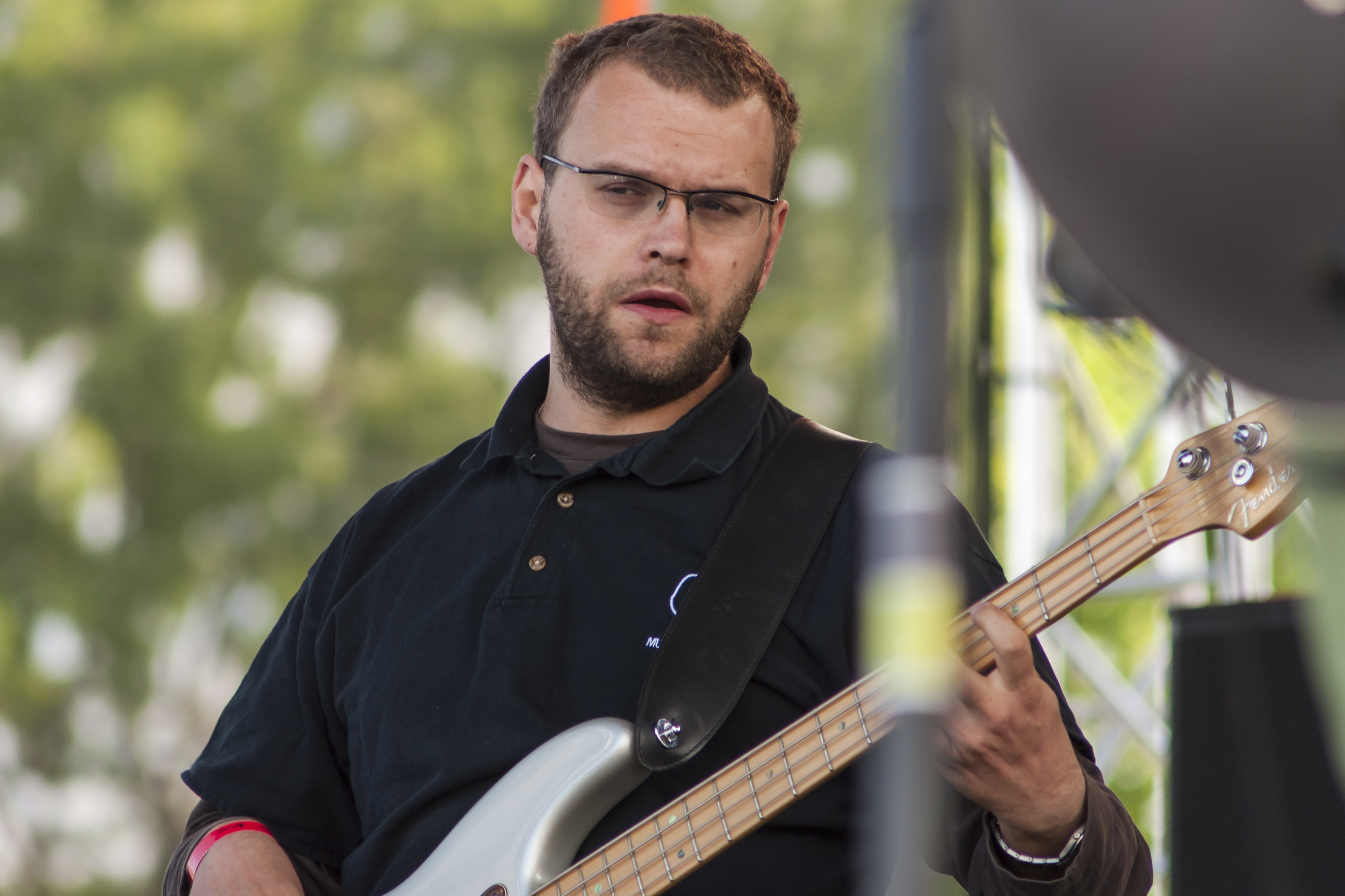 Marek „Melo” Mrzyczek z zespołu Koniec Świata na Festiwalu Ursynalia 2014